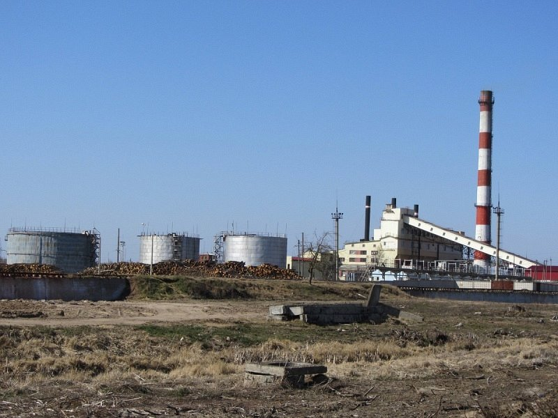 Арэхаўск. Беларуская ДРЭС